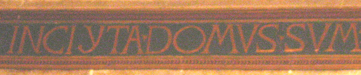 Detall de la inscripció llatina de la Llotja de la Seda, València. Detail of the Latin inscription in the Silk Exchange (Llotja de la Seda)in Valencia, Spain.